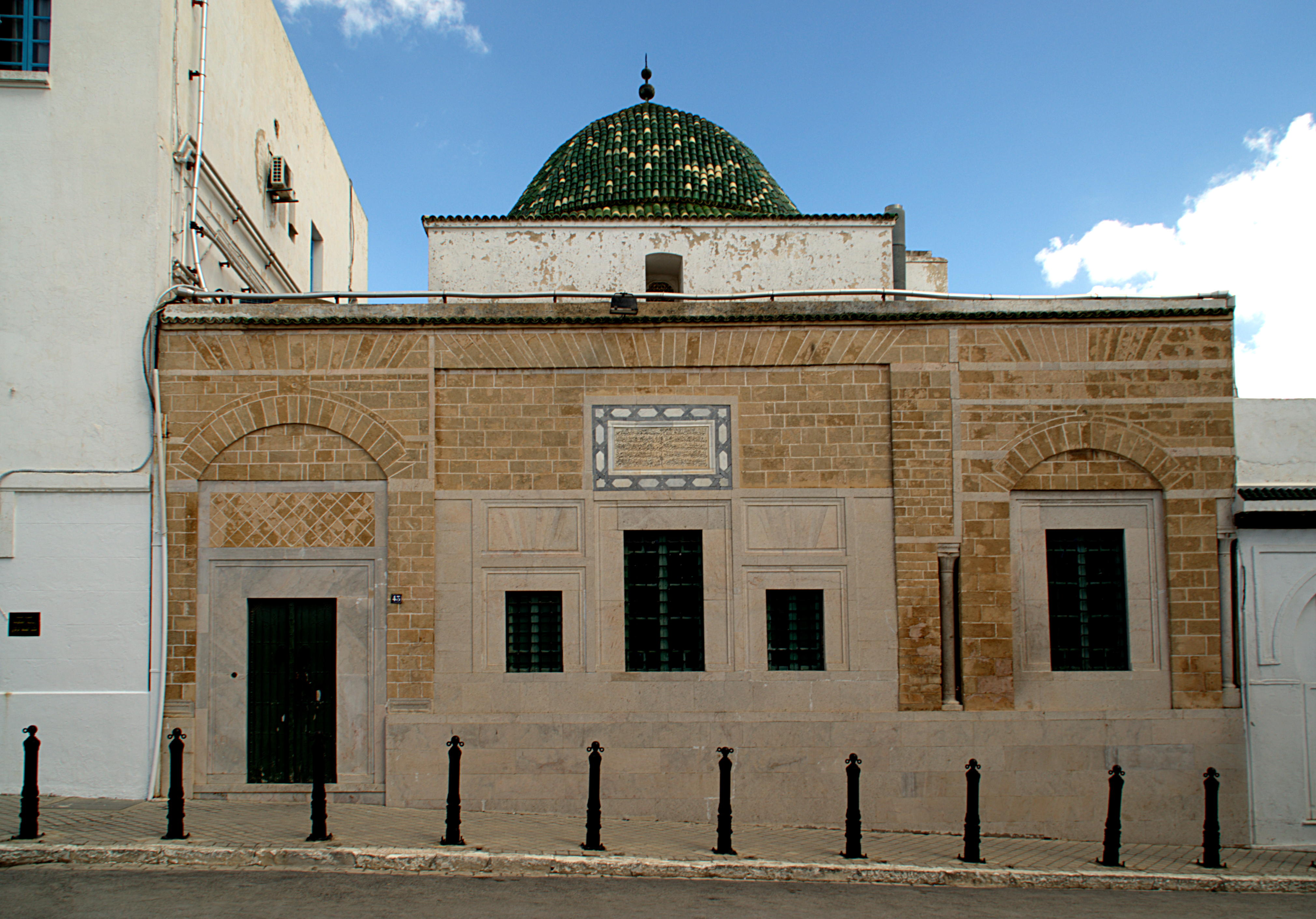 Tourba Hafiz-Khoudja, près de Sidi-ben-Ziad, Tunis